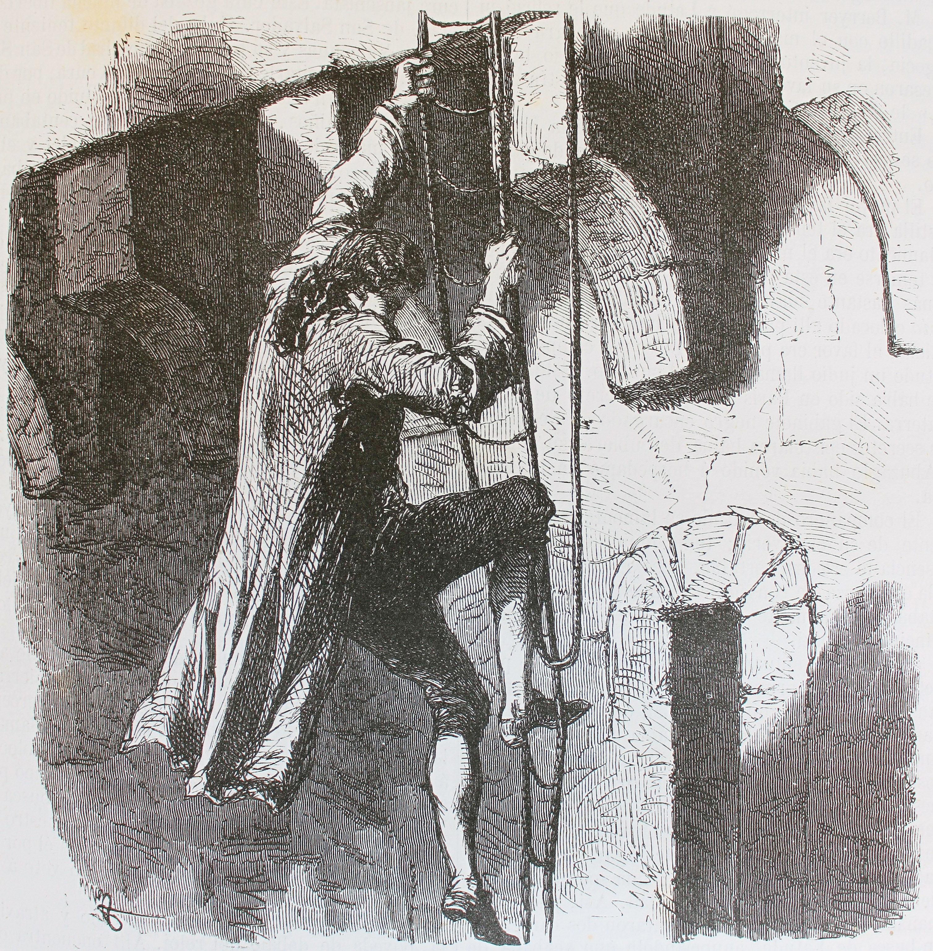 Ilustraciones de la obra : Anales dramáticos del crimen ó Causas célebres españolas y estranjeras [sic] / estractadas [sic] de los originales y traducidas, bajo la dirección de José de Vicente y Caravantes. - Madrid : Imprenta de Fernando Gaspar [etc.], 1858-1866. - Ed. il. con grabados... "La justicia de Estado. Latude. (1749-1784). Su cuerpo oscilaba y daba vueltas en el aire".